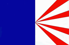 Pavillon de la Société Nationale pour le Patrimoine des Phares et Balises